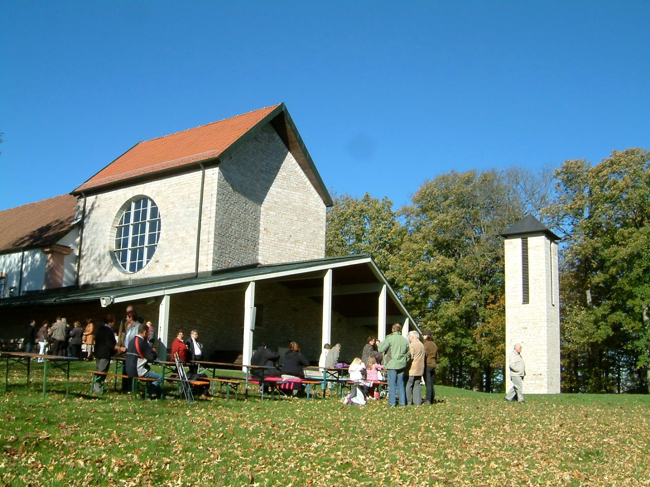 Wallfahrtskirche Maria Ehrenberg - Chor mit Glockenturm